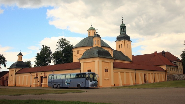 Stoczek Klasztorny – wieś w województwie warmińsko-mazurskim, w powiecie lidzbarskim, w gminie Kiwity. Sanktuarium Matki Bożej Królowej Pokoju